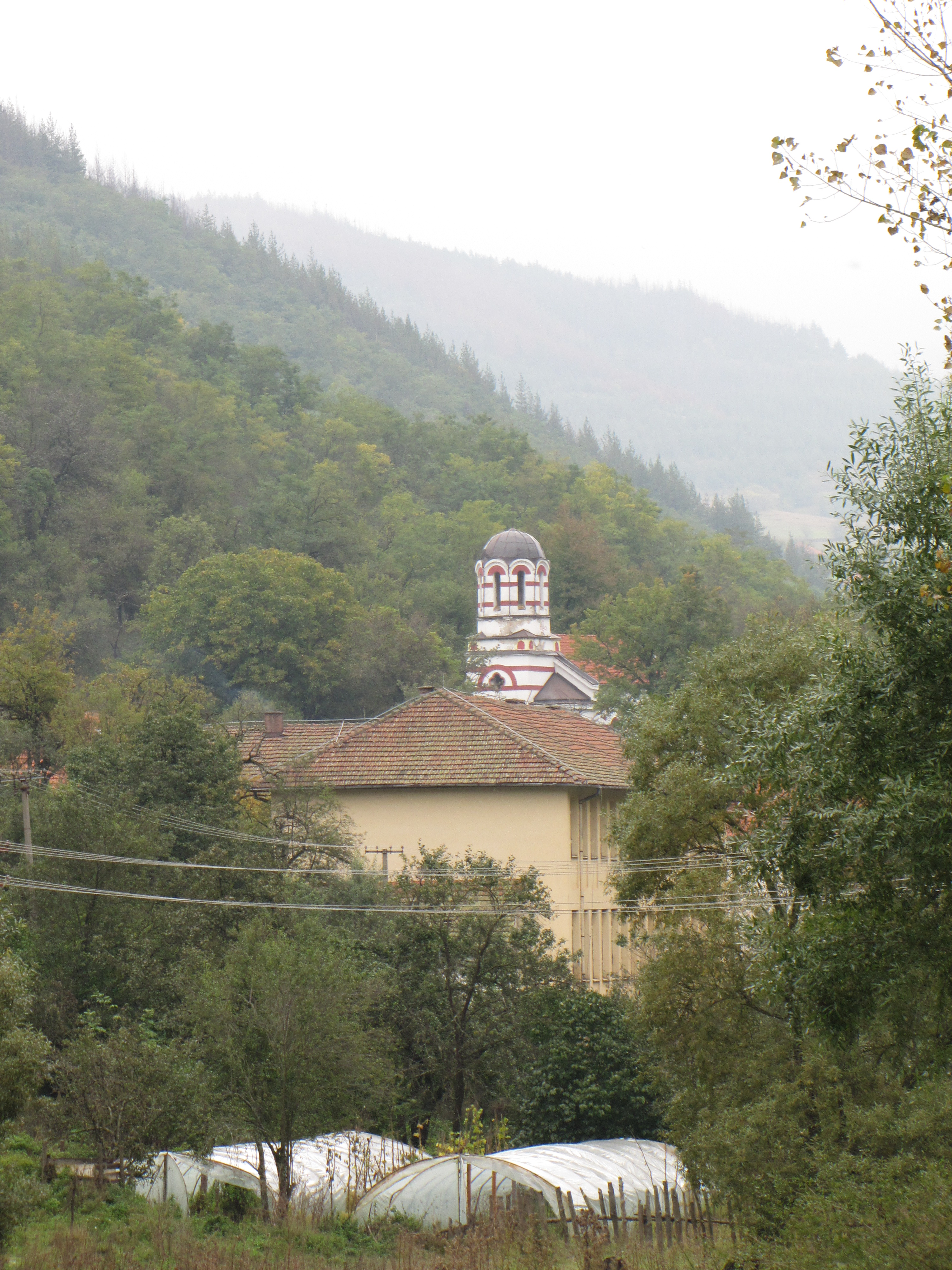 Село Горња Љубата (Босилеград).